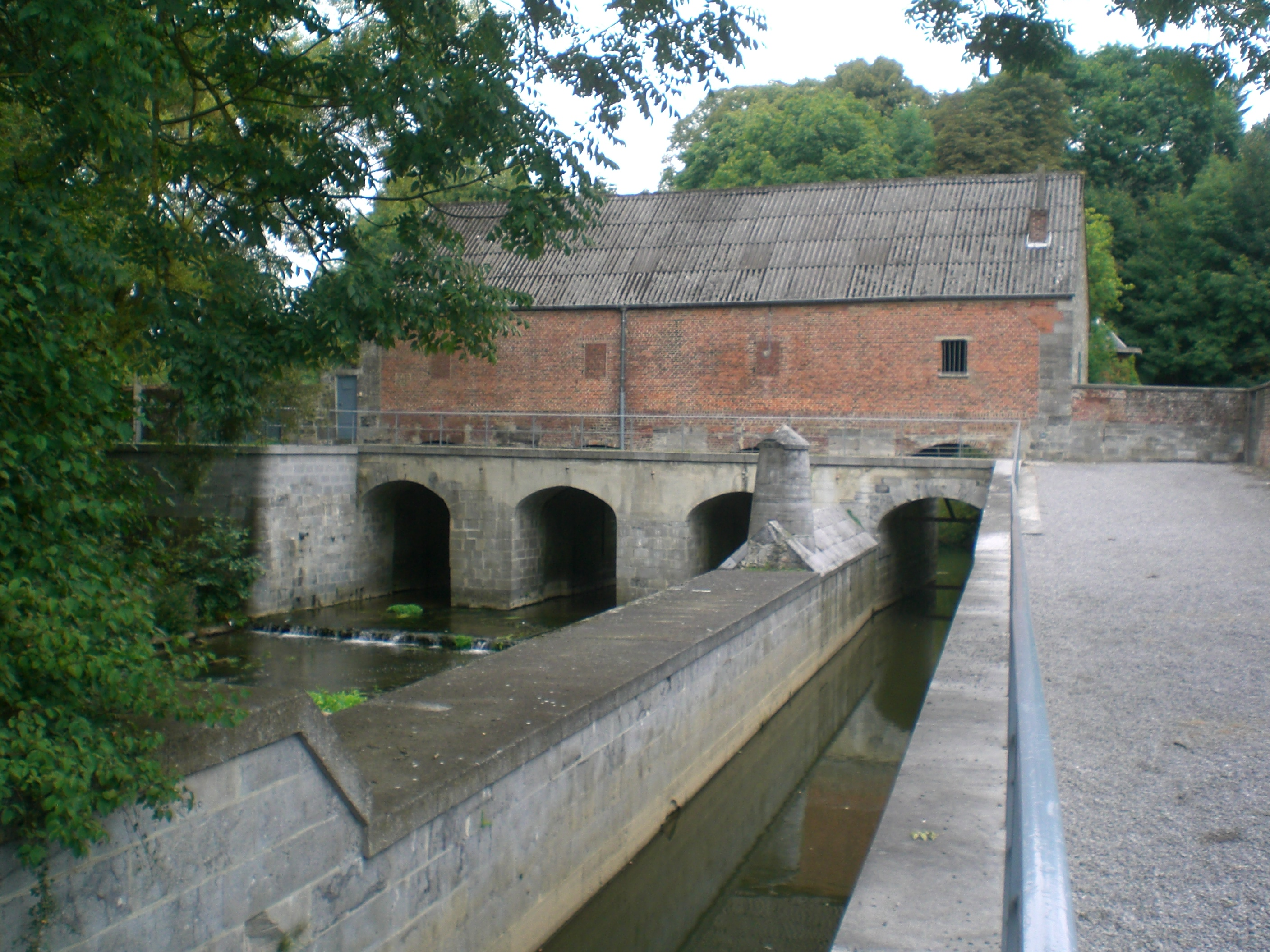 barrage d'avesnes sur help dit "le ponts aux dames" nord france